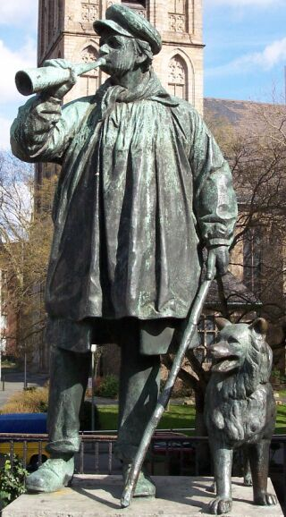 Kuhirte. Denkmal in Bochum von Walter Kruse. Es zeigt Fritz Kortebusch, den letzten Kuhhirten Bochums, mit seinem Hund und ist die Nachgestaltung eines Denkmals von August Schmiemann, das im Zweiten Weltkrieg eingeschmolzen wurde (siehe Foto davon).